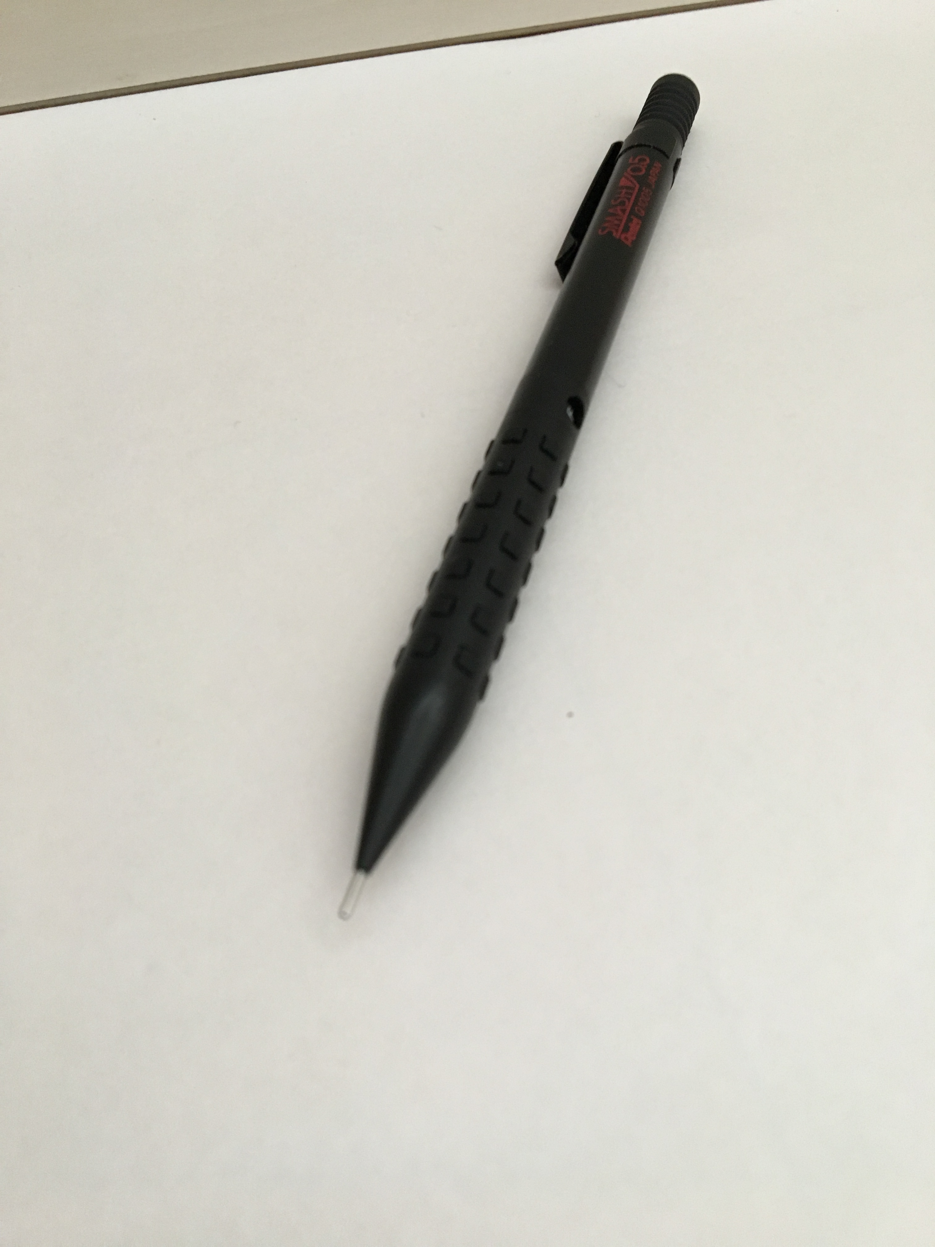 シャーペン